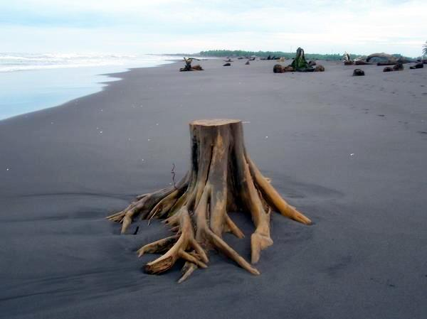 Playa de Champerico